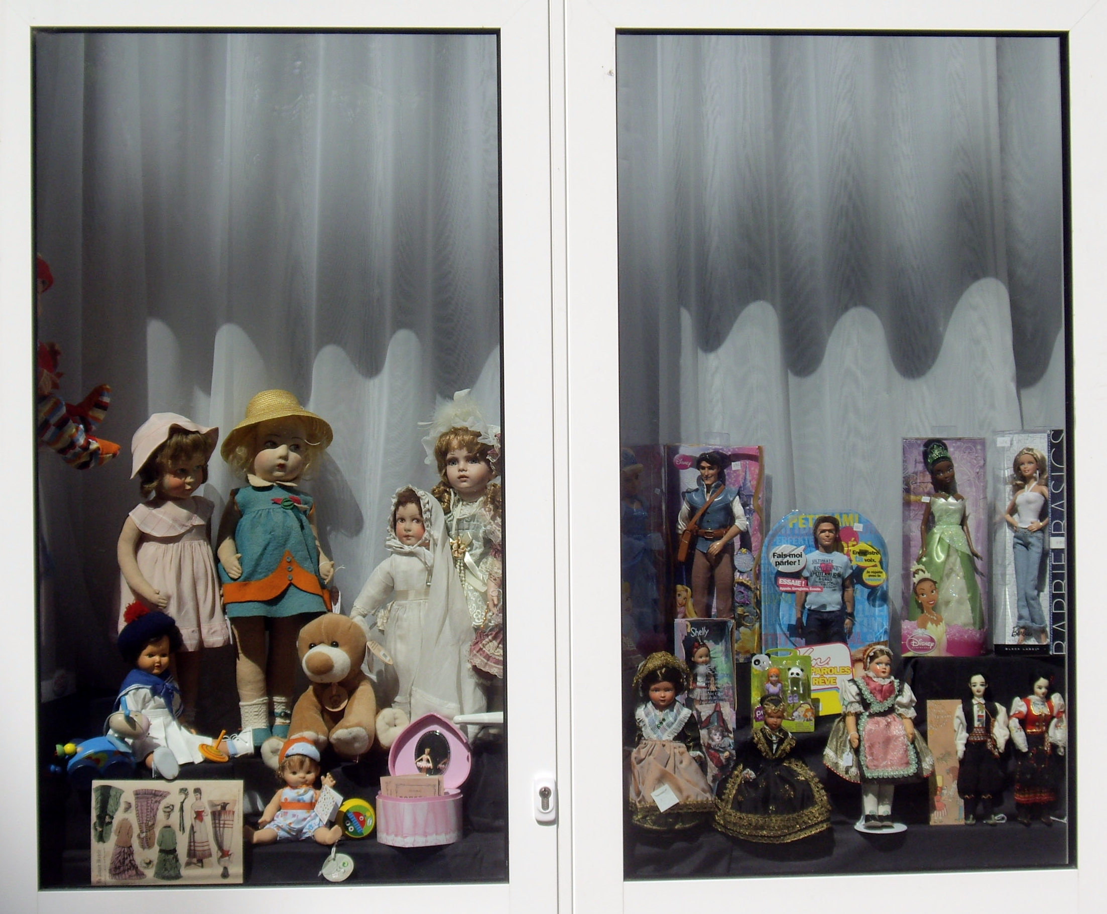 Poupées exposées dans l'impasse Berthaud, à l'extérieur du musée de la Poupée, Paris 3e.